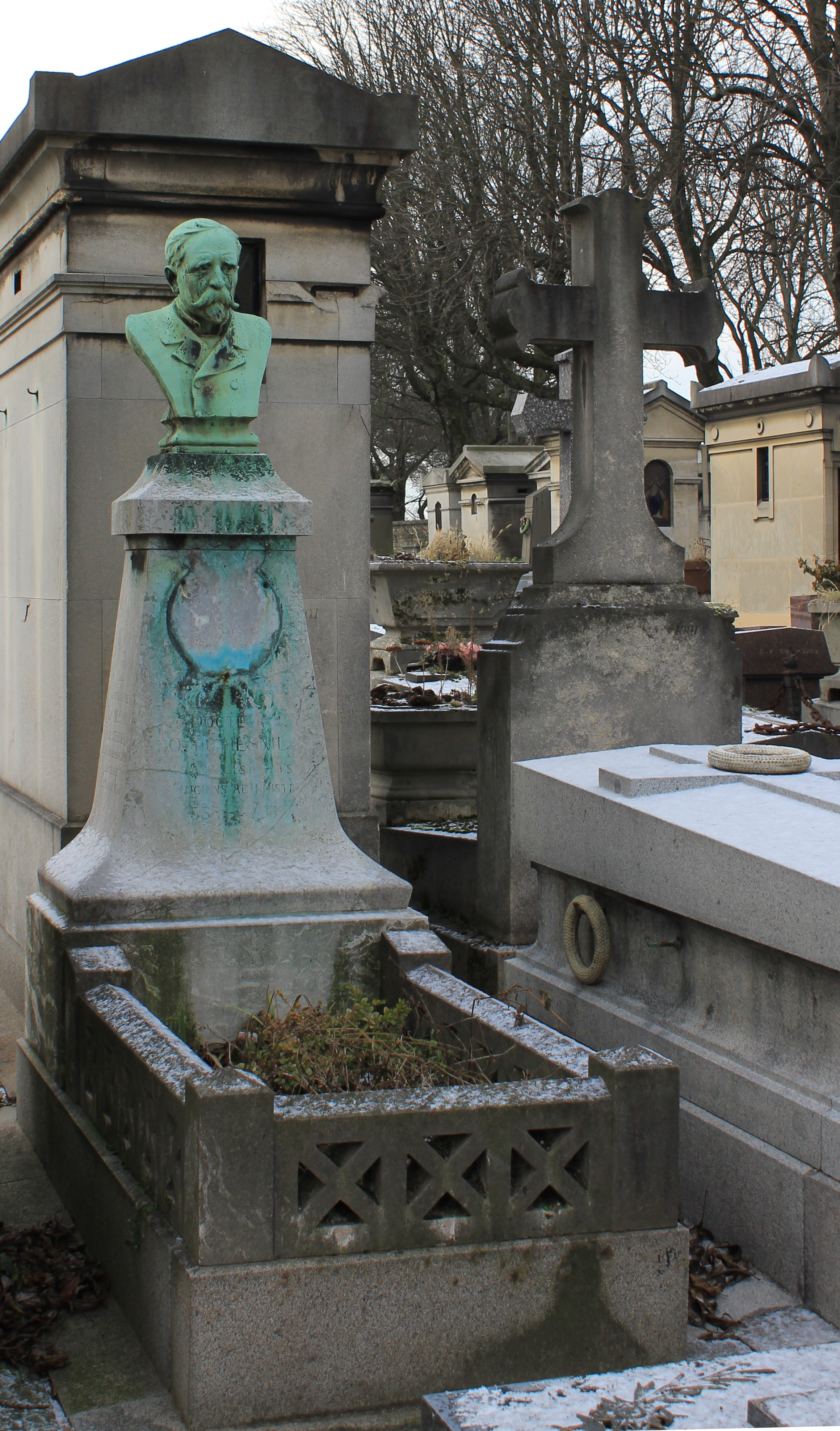 Sépulture du docteur Octave Victor Germain Fleury du Mesnil (1832-1898) et Edmond du Mesnil (1866-1928), directeur du Rappel.